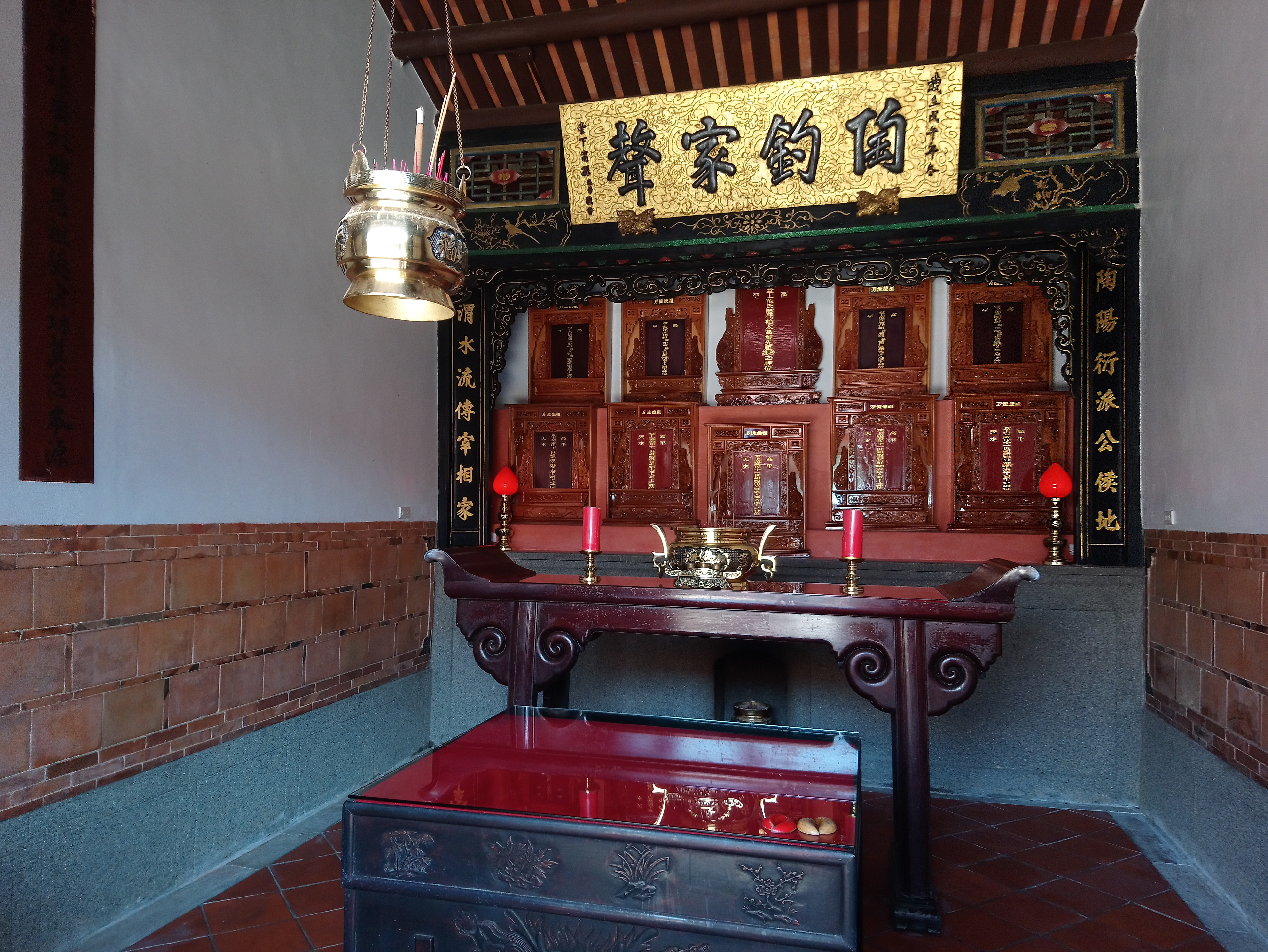 新屋范姜祖堂公媽廳內部,桃園市新屋區新屋次分區新生里